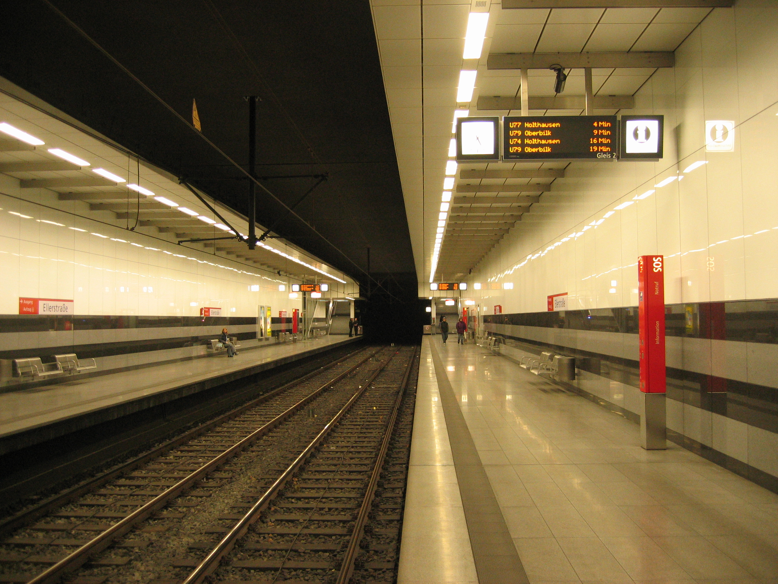 Stadtbahn Düsseldorf, U-Bahnhof Ellerstraße